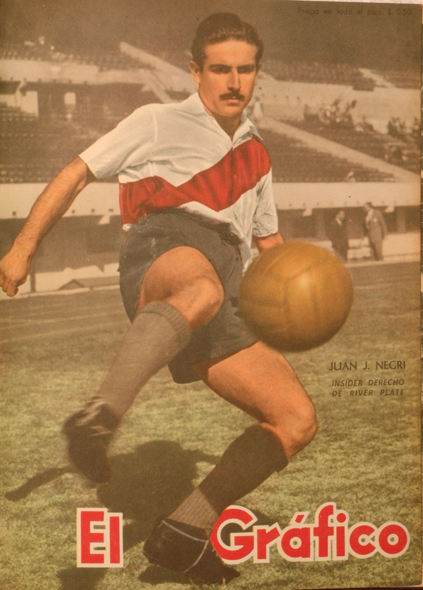 El Grafico del 23 de Septiembre de 1949. Edicion 1572